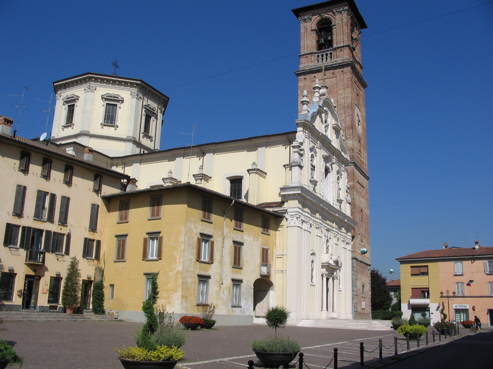 Autore Giorces. Verdello, Chiesa Giubilare dei Santi Pietro e Paolo Apostoli.